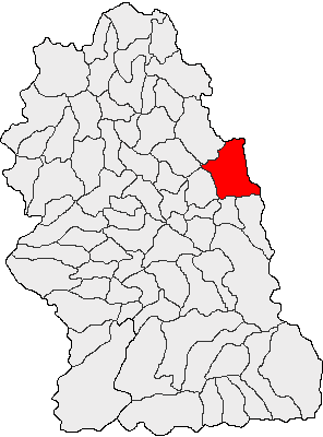 Categorie:Hărţi ale judeţului Hunedoara